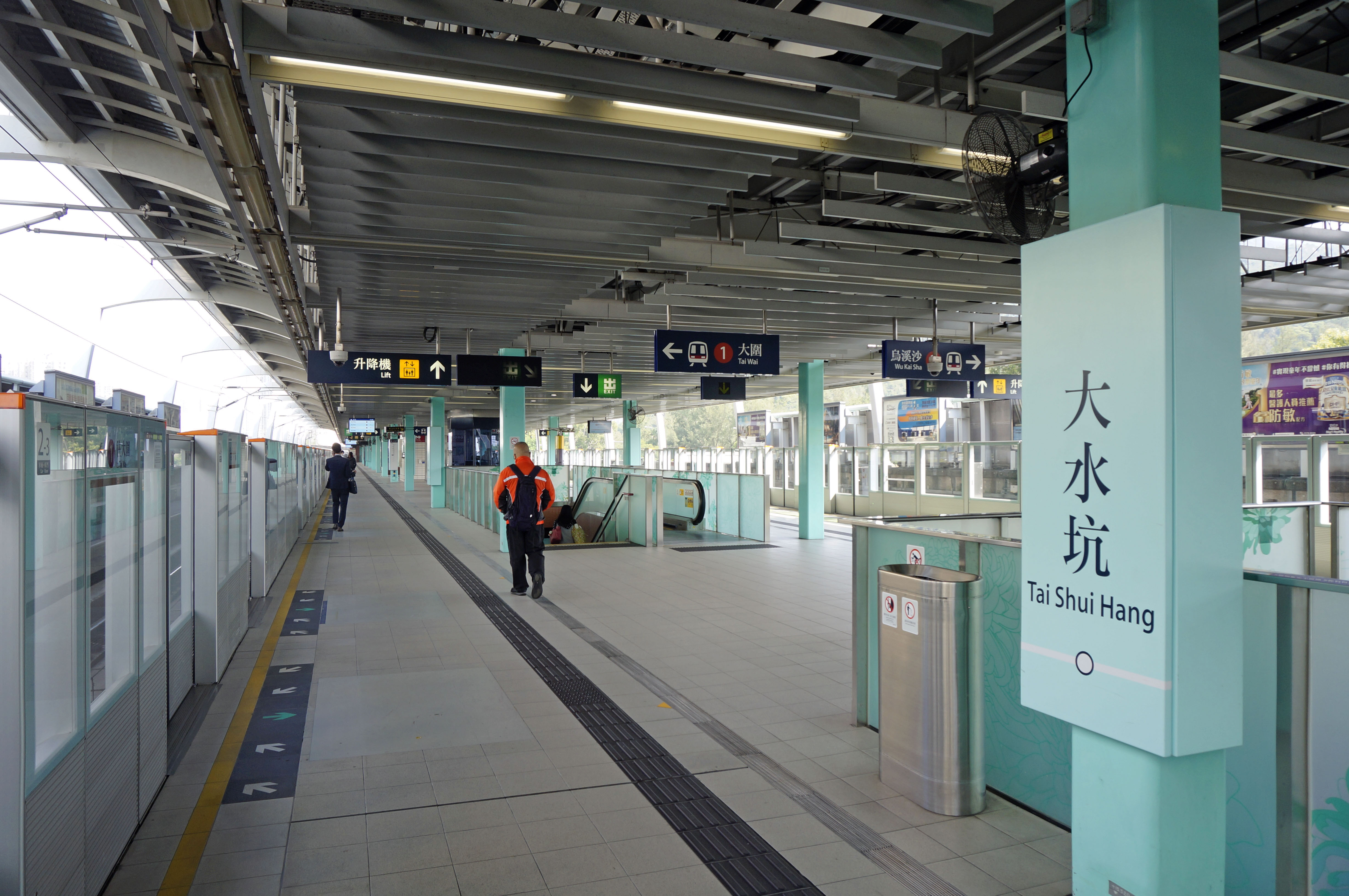 港鐵大水坑站月台